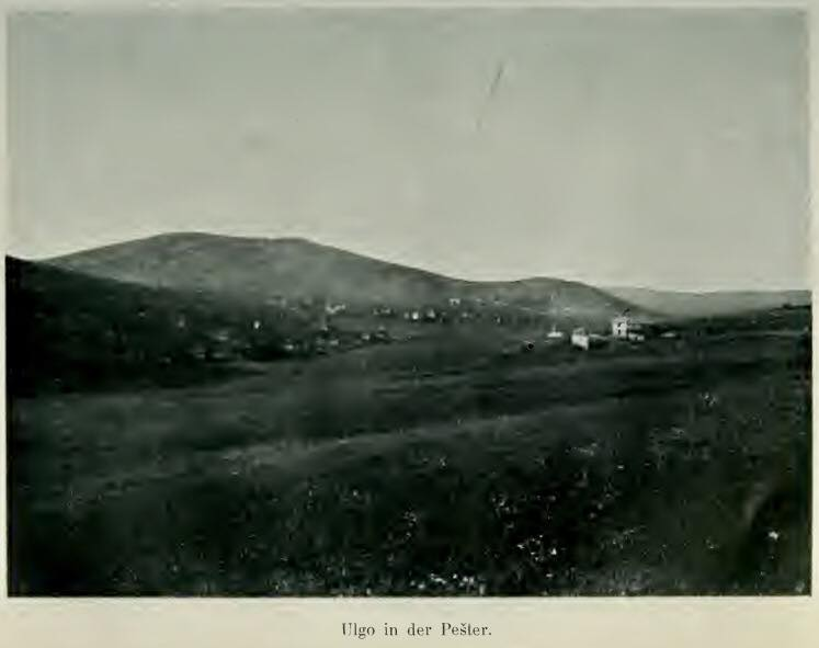 Foto e viti 1915, fshati Uglla, rrafshnalta e Peshterit, Sanxhaku i Novi Pazarit